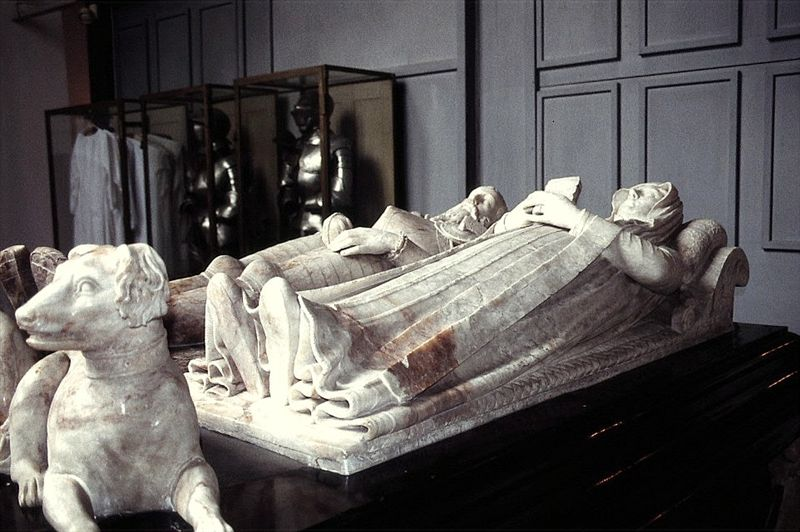 Herlufsholms Kirke i Danmark. Sarkofag for Herluf Trolle og Birgitte Gøye